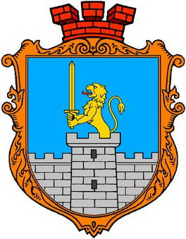 Герб с. Буданів